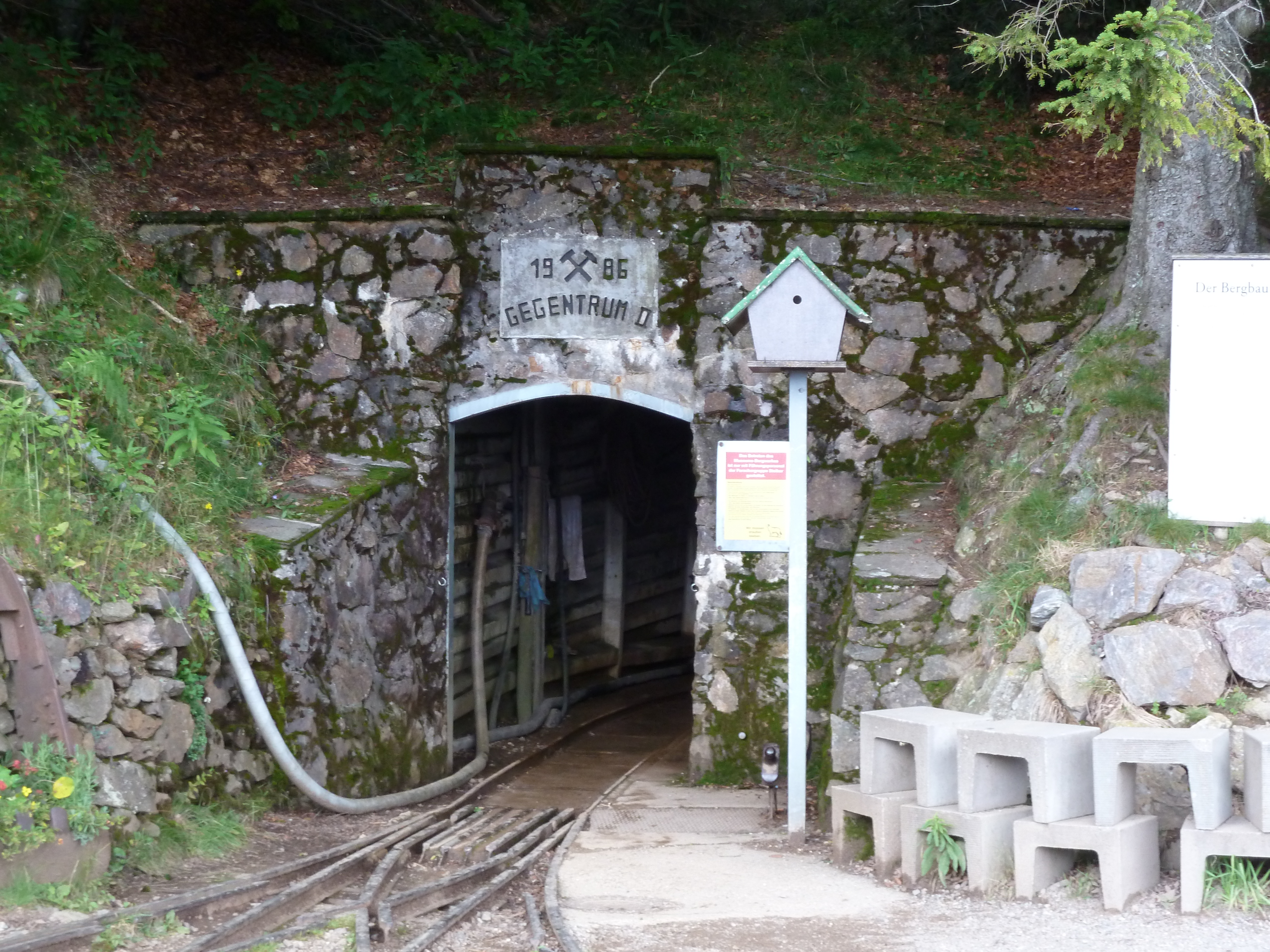 Eingang zum Besucherbergwerk auf dem Berg Schauinsland, Stollen Gegentrum II